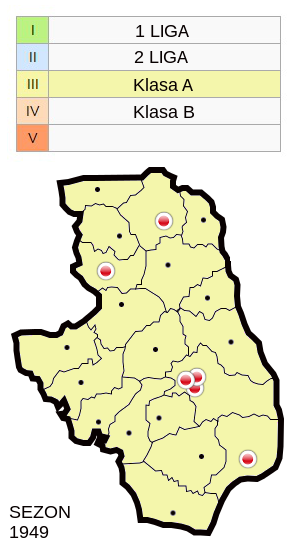 Jagiellonia w sezonie 1949 - mapa klubów